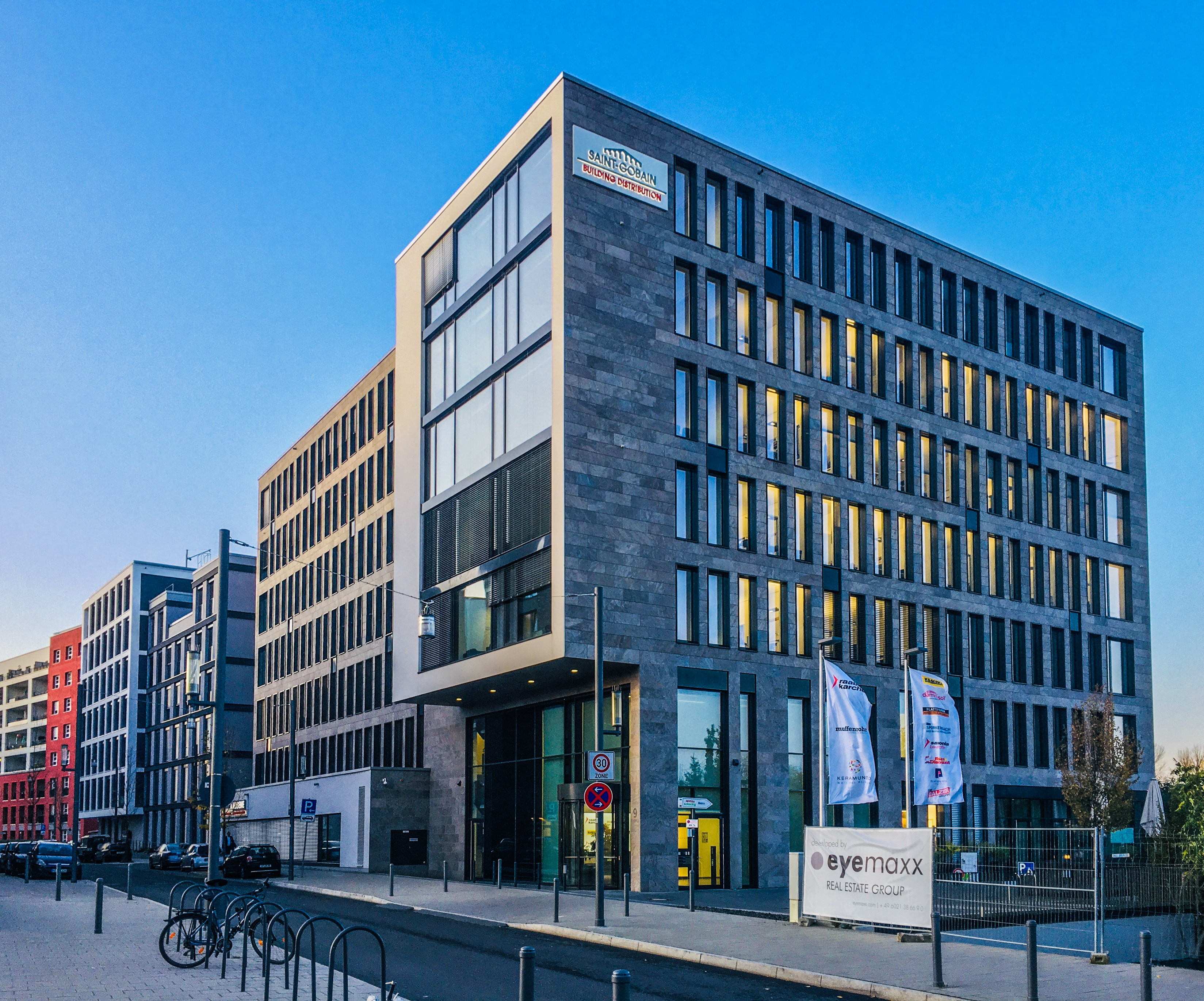 Firmensitz der Saint-Gobain Building Distribution Deutschland In Offenbach am Main